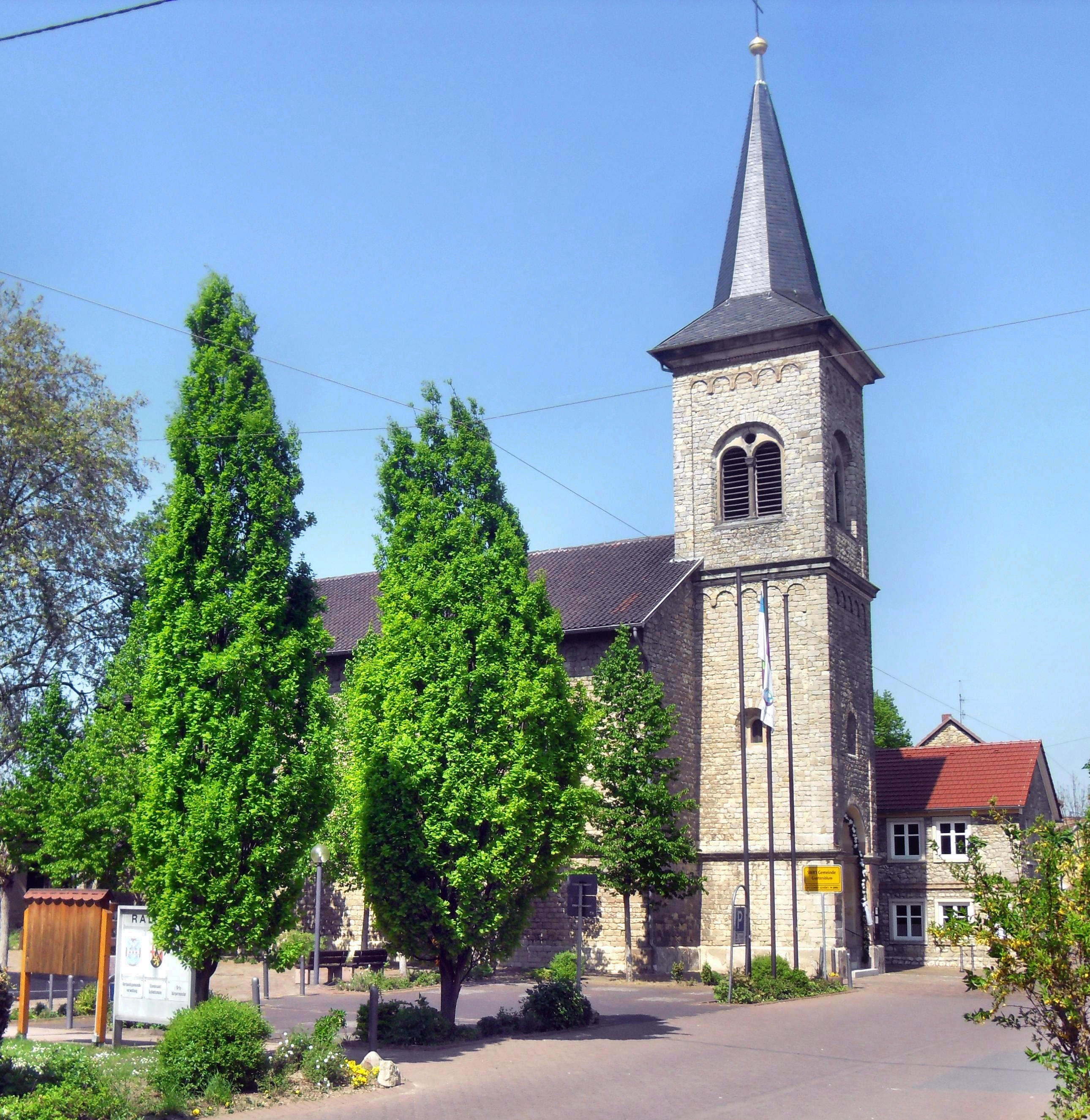 Guntersblumer katholische Kirche